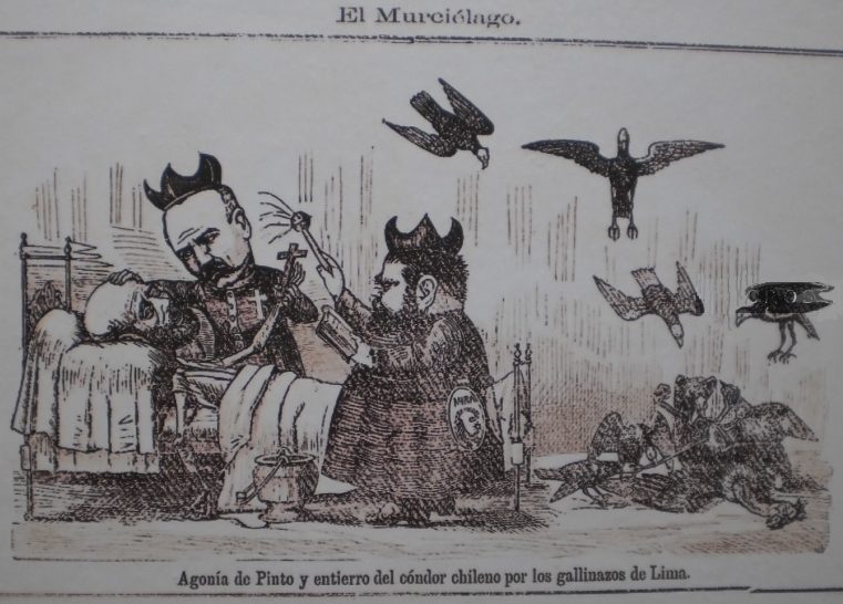 Agonía de Pinto y entierro del cóndor chileno por los gallinazos de Lima. El Murciélago nº 30. Lima 30 de julio de 1879, p. 127 Xilografía sobre papel. (Aníbal Pinto agoniza acompañado de los escritores Vicuña Mackenna y Rafael Vial. A un lado los gallinazos de Lima derrotan al símbolo de Chile).